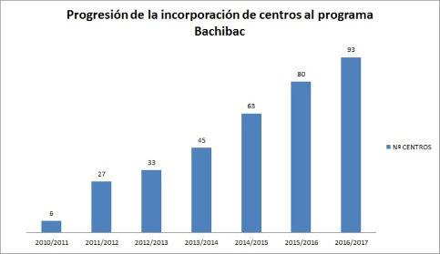 Progresion anual de centros con programa Bachibac hasta 2017